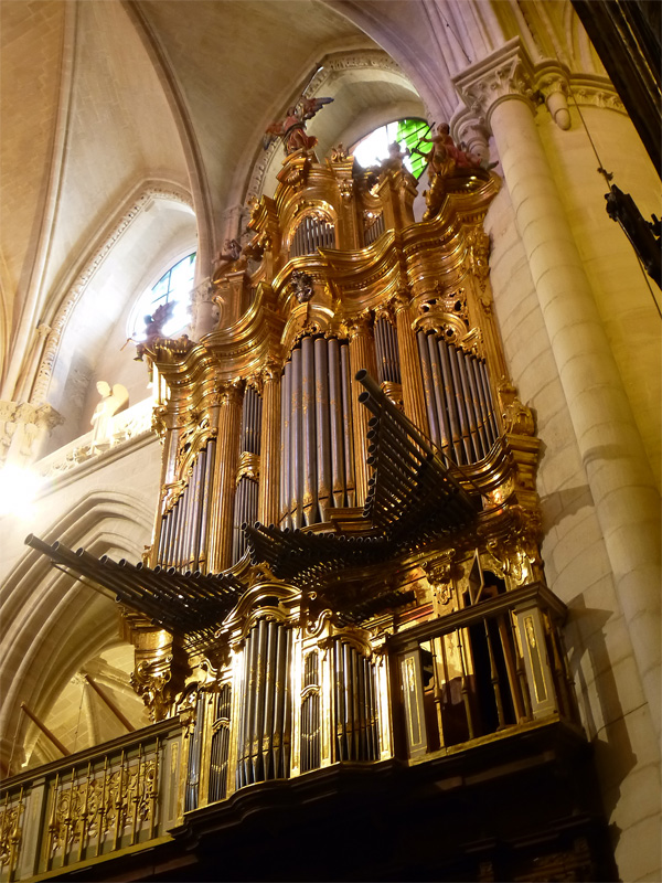 Catedral de Santa María y San Julián, Cuenca, Castilla-La Mancha, España.